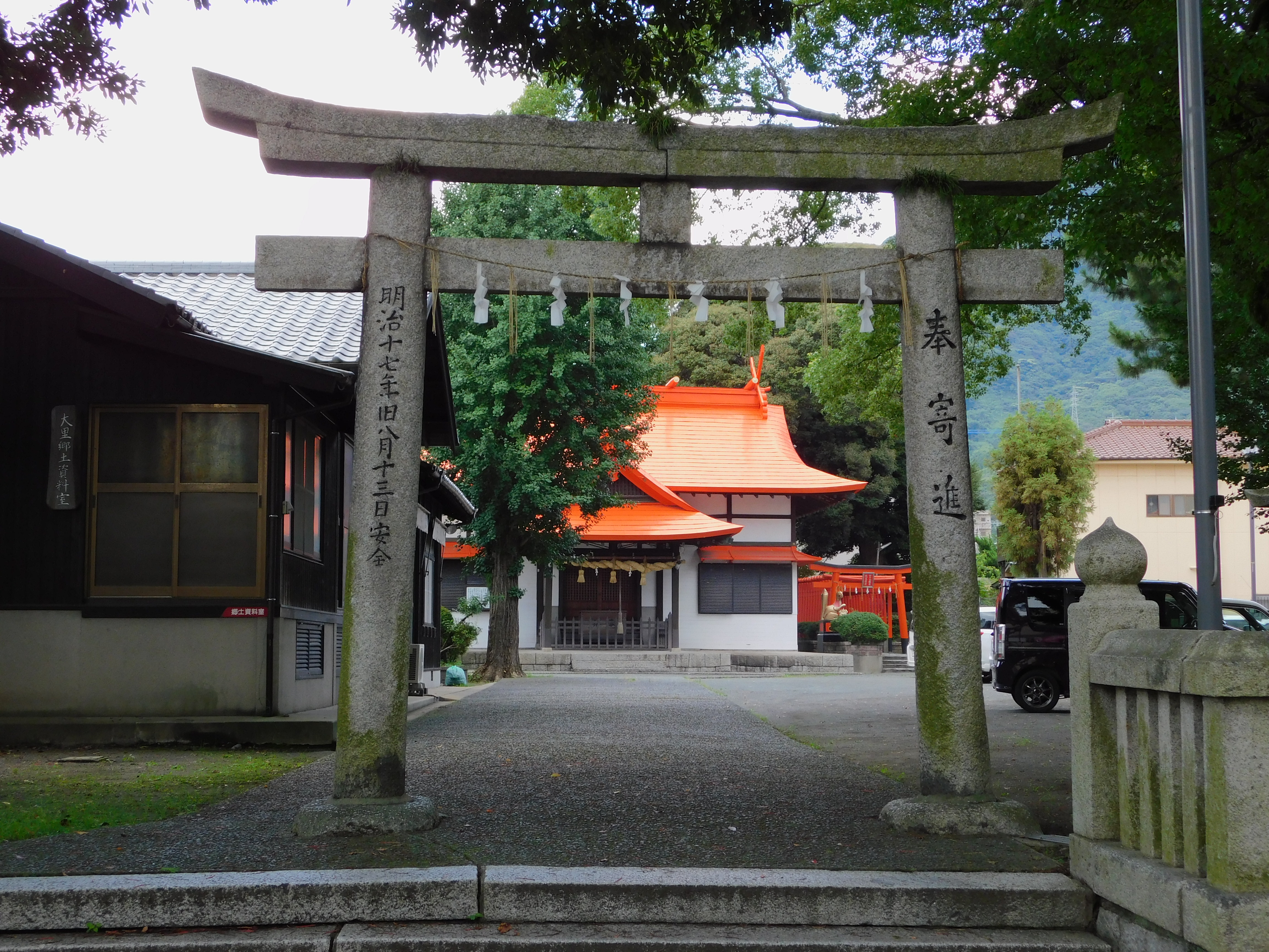 御所神社 (北九州市門司区大里) (安徳天皇の柳の御所比定地) 2019年7月27日撮影